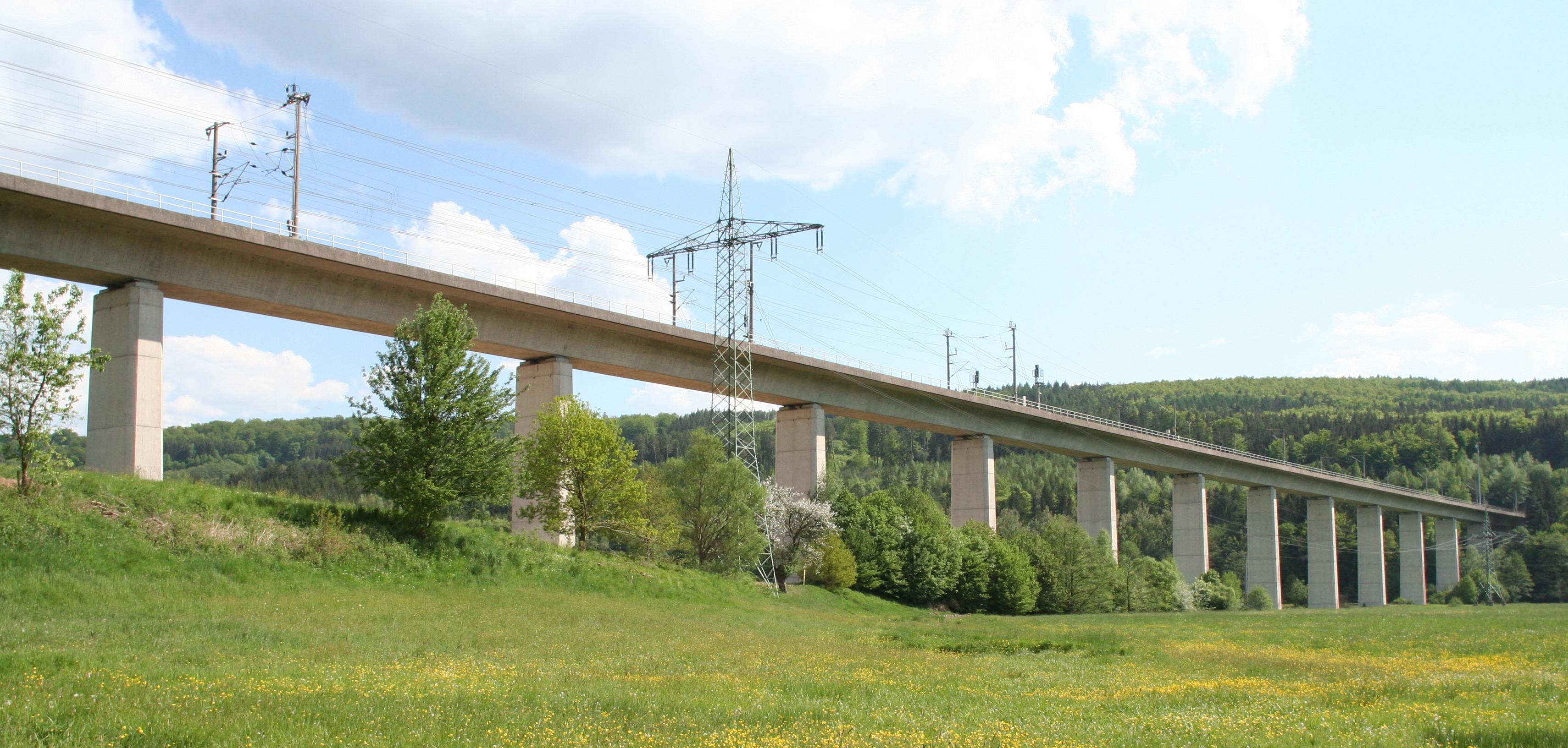 Sinntalbrücke Zeitlofs in Unterfranken